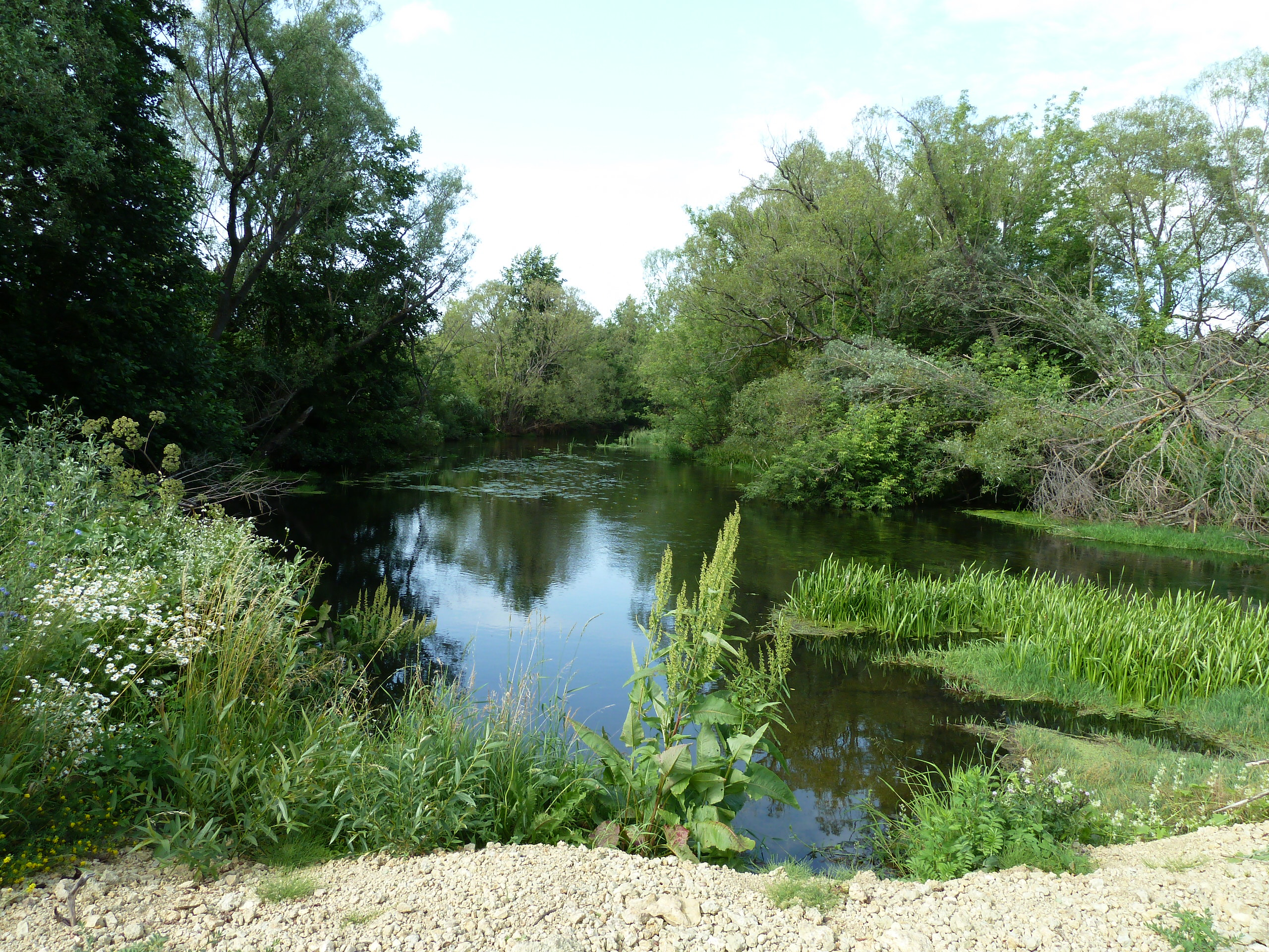 р.Раковка в д.Раковка